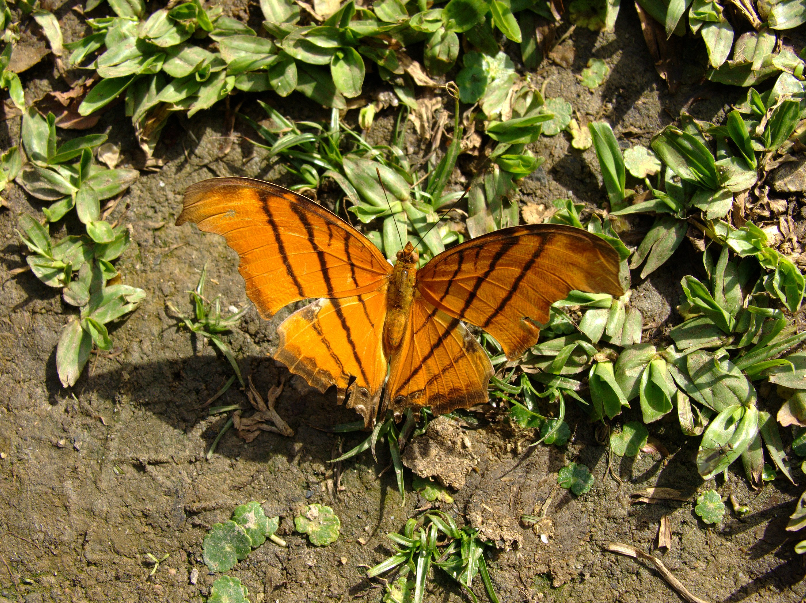 Marpesia petreus (Nymphalidae, Biblidinae), Curitiba, Brasil.